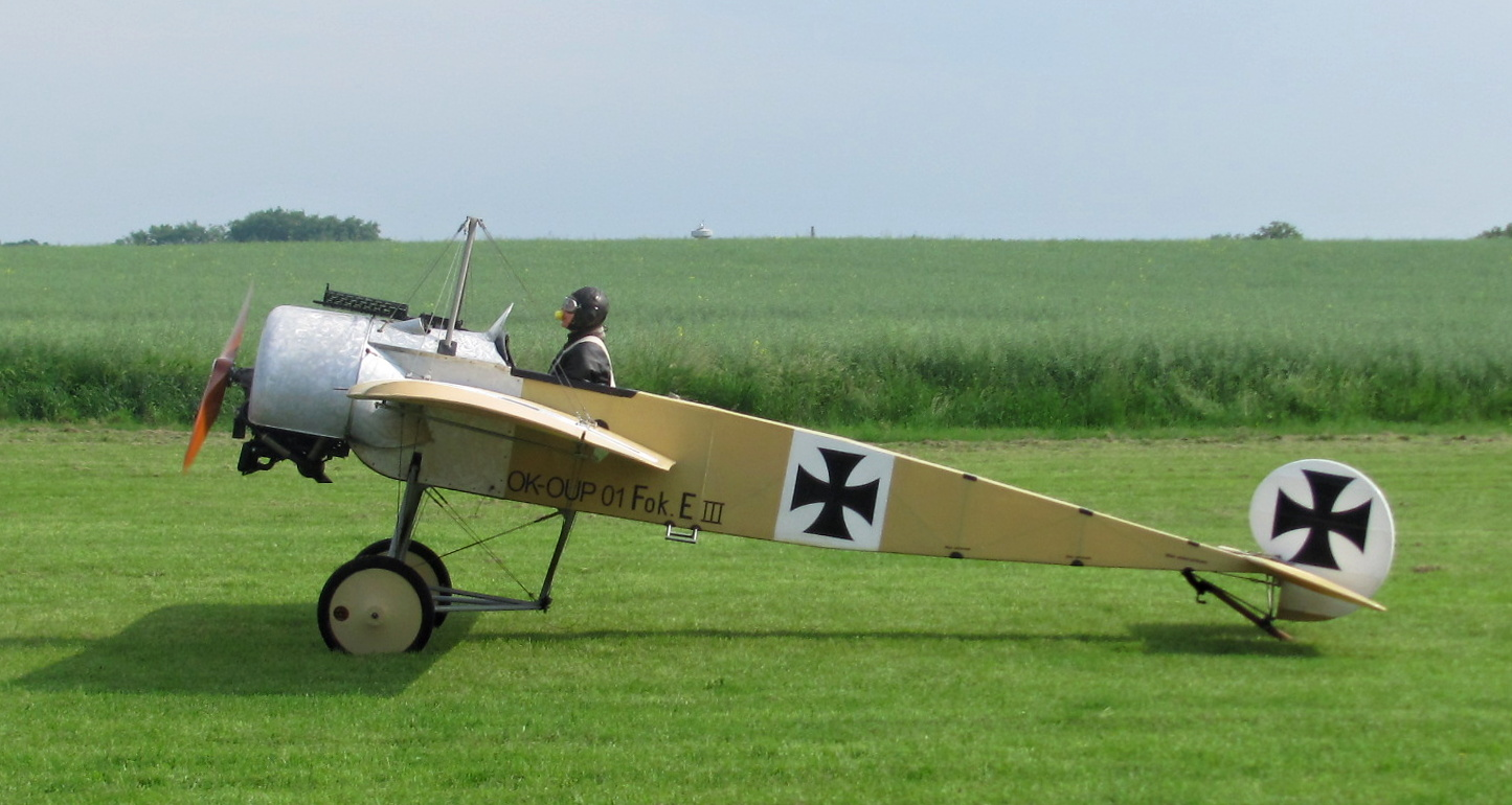 Fokker E.III na letišti v Jaroměři, Pterodactyl Flight, Radka Máchová, 2016